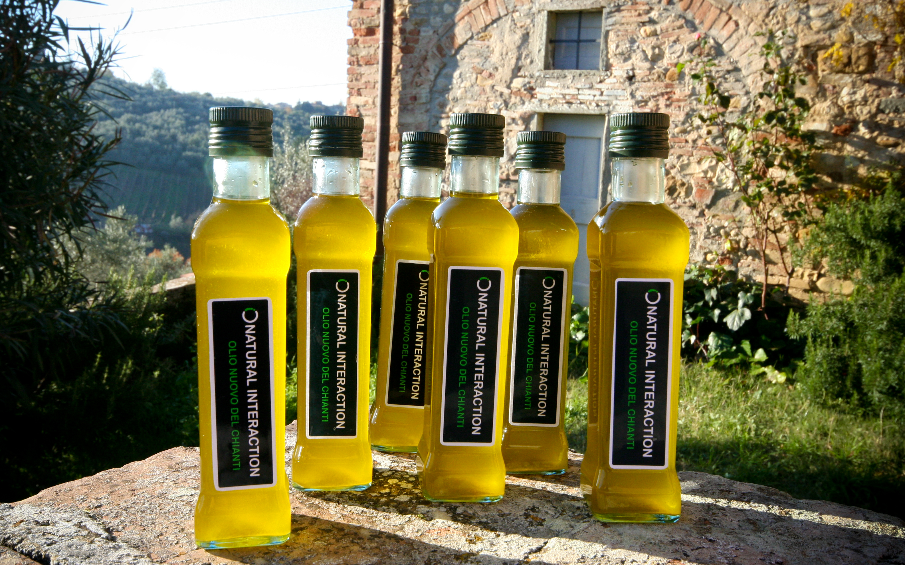 Olio nuovo del Chianti - Italia.